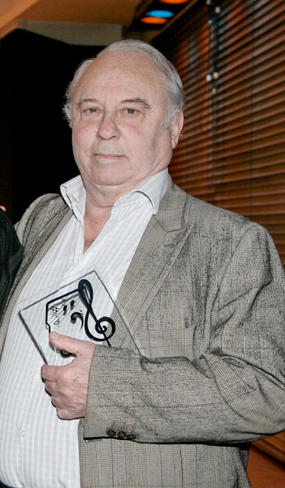 foto di Alain Goraguer